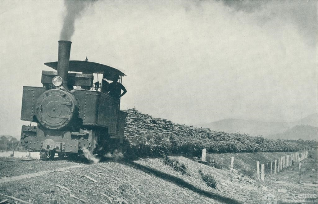 Zuckerrohrtransport per Schmalspurbahn zur Zuckerfabrik in Babinda (Queensland)